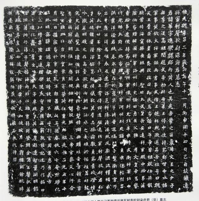 冉闵子孫，染華，墓志原文题首为《唯大魏孝昌二年岁次丙午十一月丙申朔己酉故镇远将军射声校尉染府君墓志》，志青石质，形状为方形，高和宽都是58.5厘米，厚度为9.5厘米。碑文共25行，满行25字，共553字。